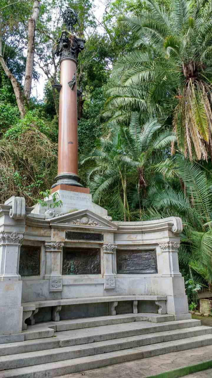 Outubro/2016 Foto: Felipe Miranda